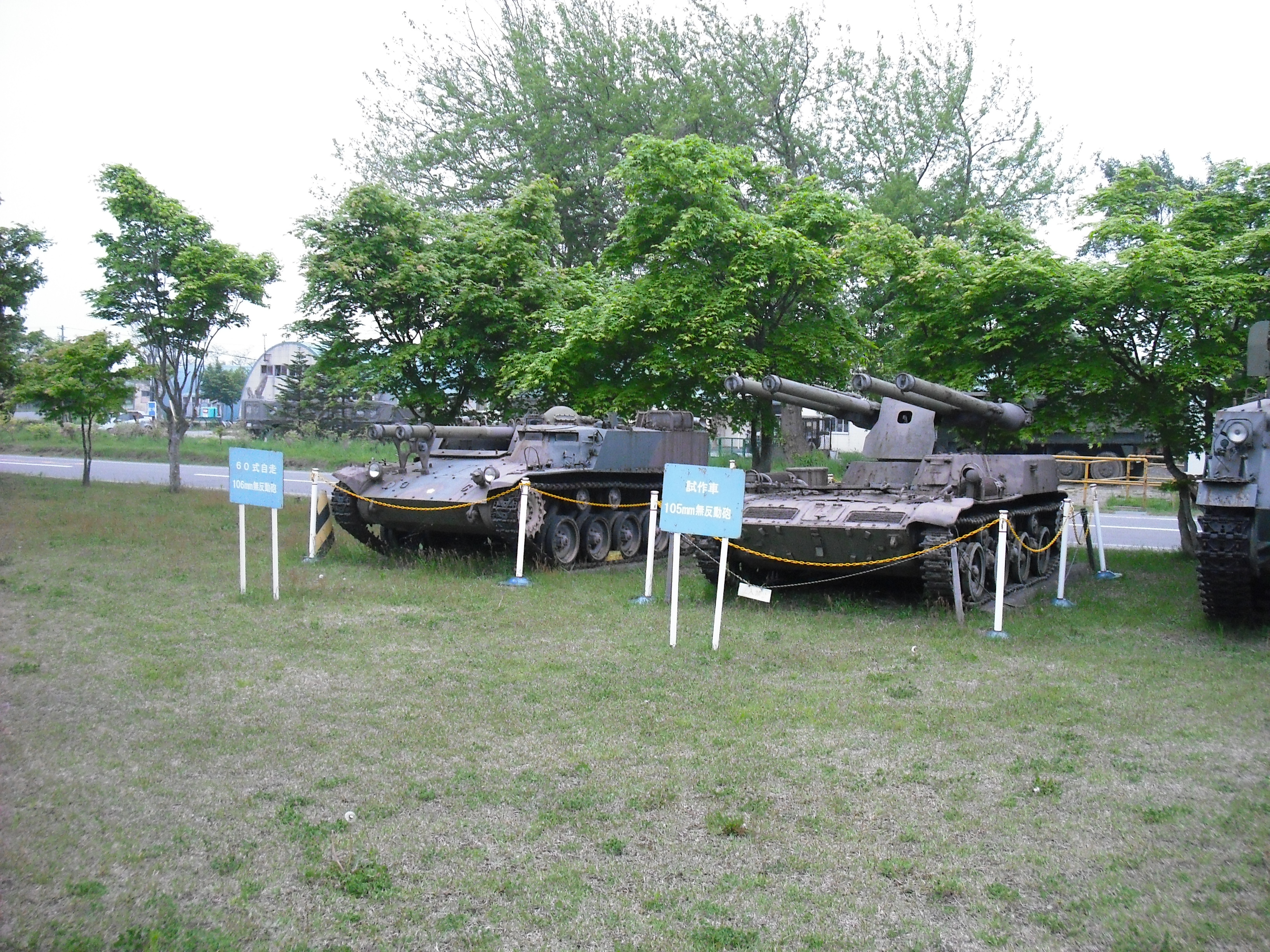 東千歳駐屯地資料館にて